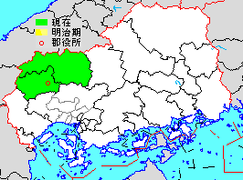 山県郡の範囲 黄：明治期、緑：現在